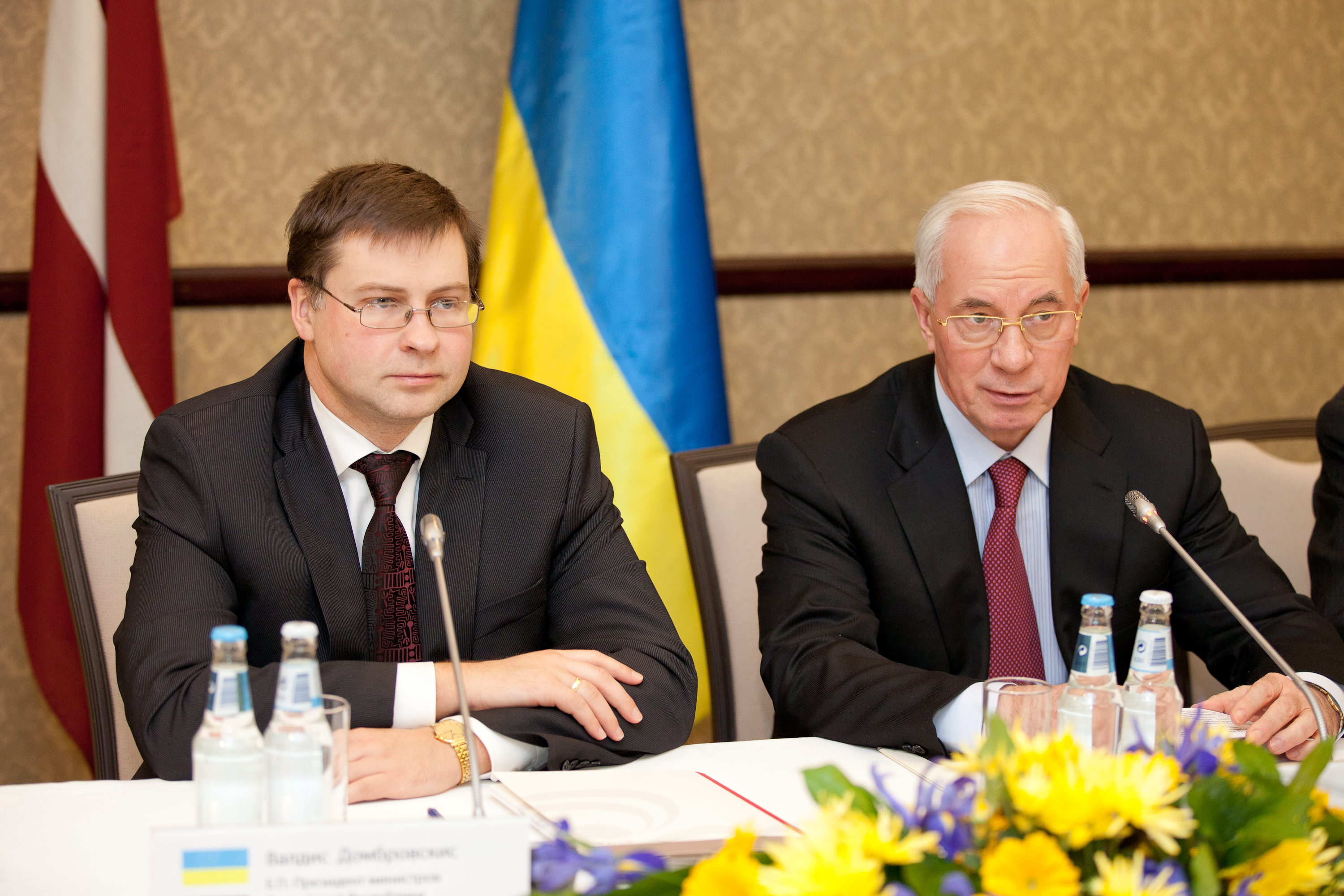 Foto: Toms Norde, Valsts kanceleja